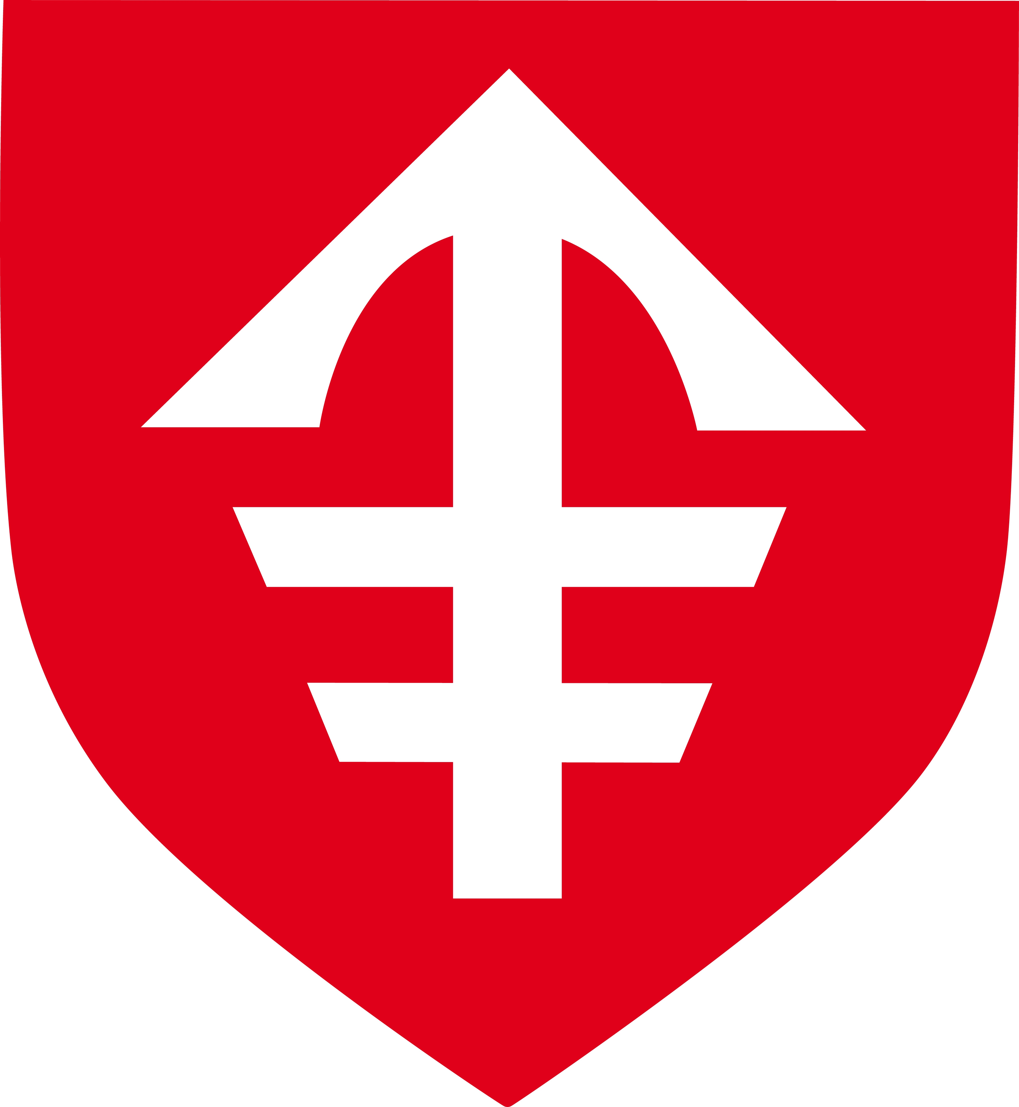 Jest to jedyny właściwy wzór herbu Jędrzejowa z tarczą herbową o właściwym kształcie.